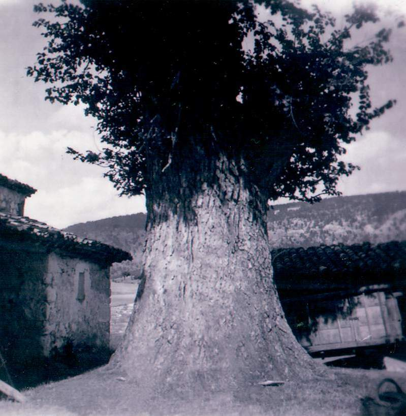 Vista parcial de la ermita de Santerón en Algarra (Cuenca), con detalle del viejo olmo (ca.1960).